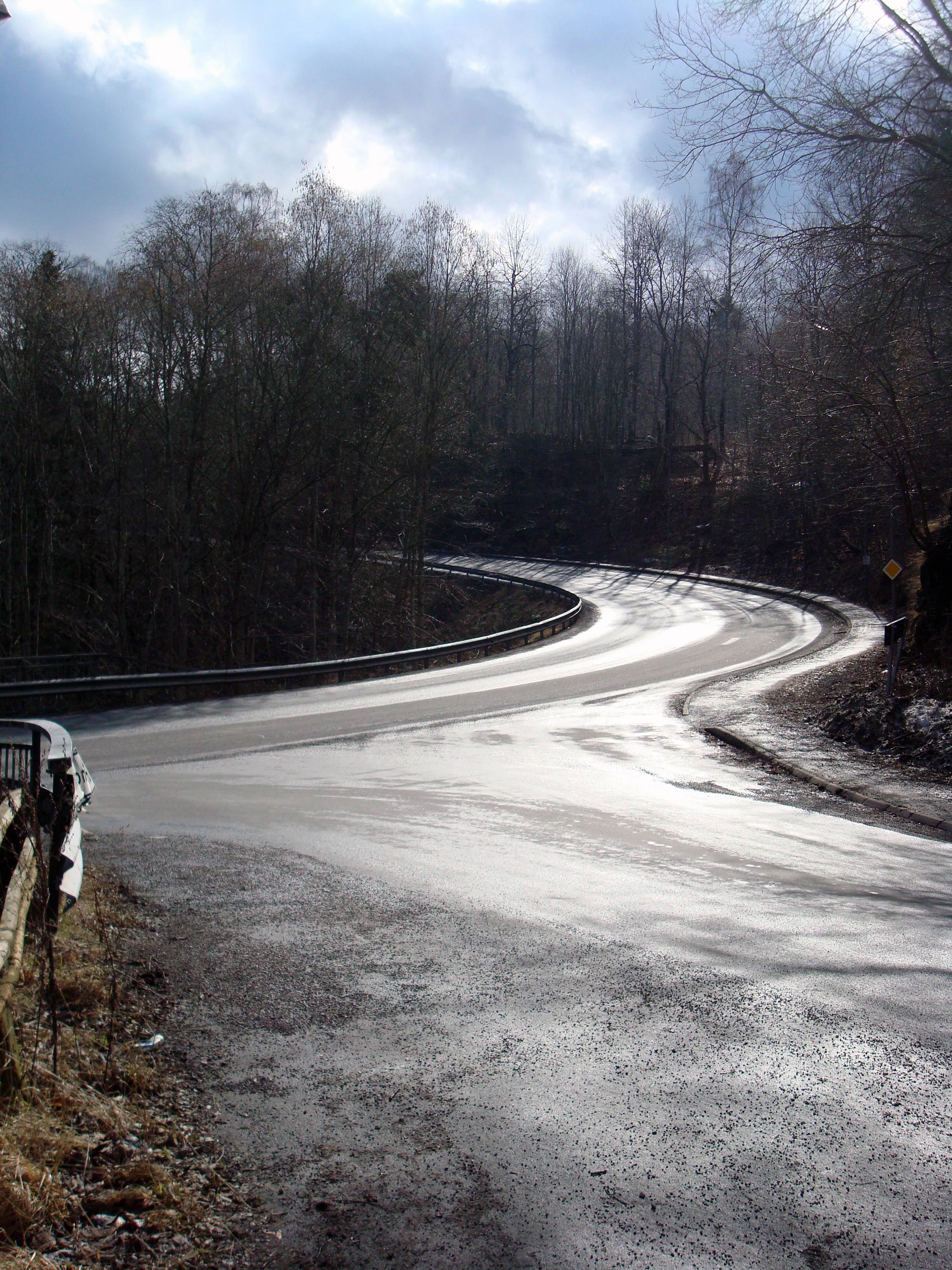 Ådalsvägen leder från Huskvarna centrum upp mot Egnahem, och byggdes under 1910-talet